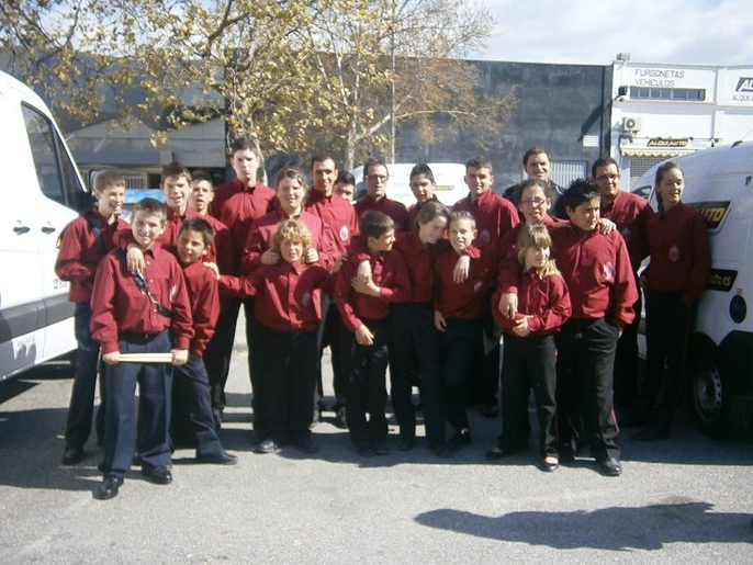 Algunos de los miembros de la Agrupación Musical Nuestra Señora de los Dolores, de Píñar (Granada, España). Actuación en el barrio del Zaidín (ciudad de Granada) en marzo de 2011.